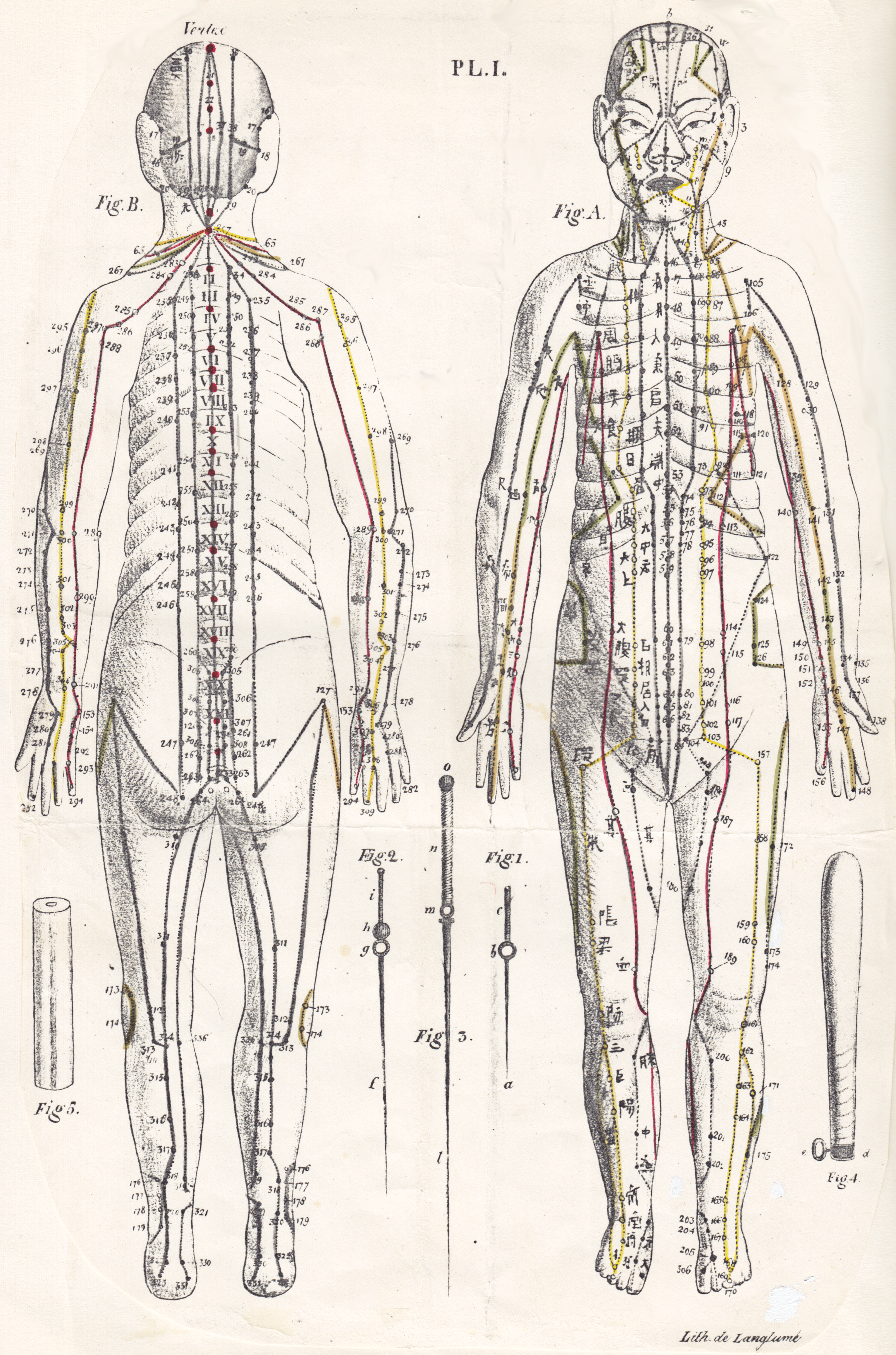 Abbildung von Akupunkturpunkten in: Sarlandiere. Memoire su l'electropuncture. Paris 1825.